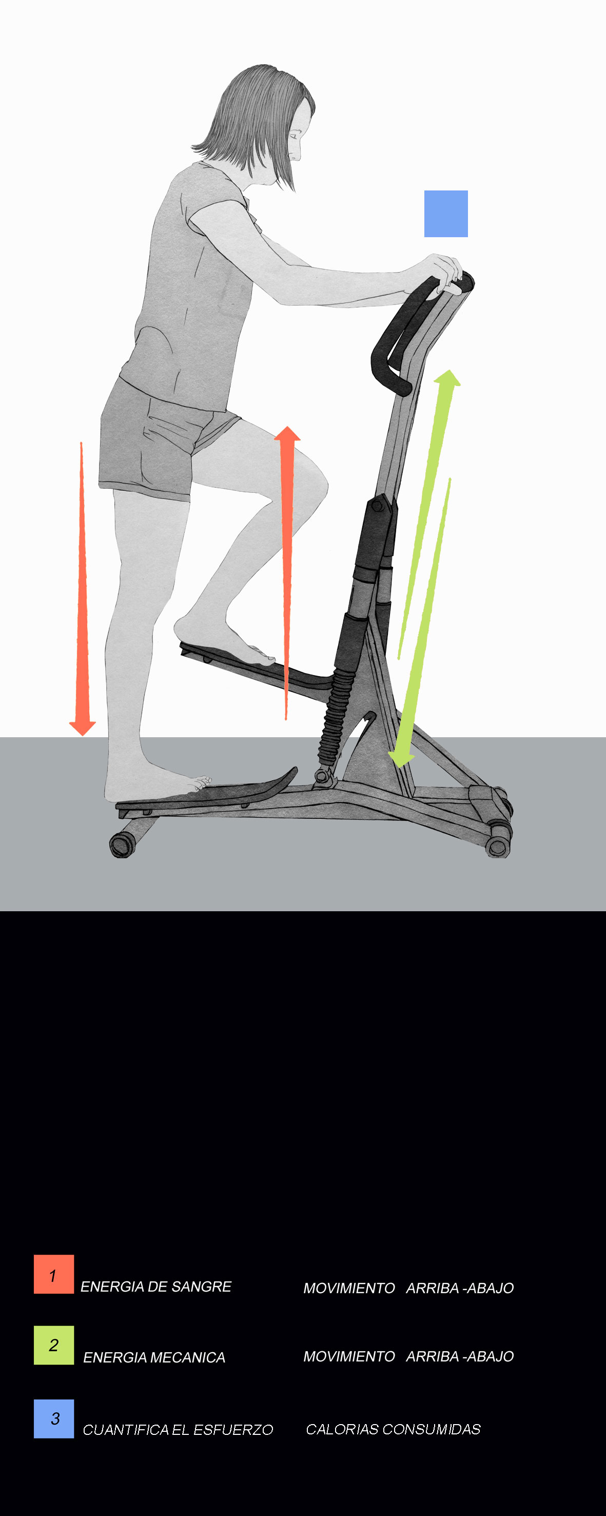 Moviments de la bicicleta estàtica. Són semblants als que en el món rural s'utilitzaven per a fer funcionar la bomba d'aigua